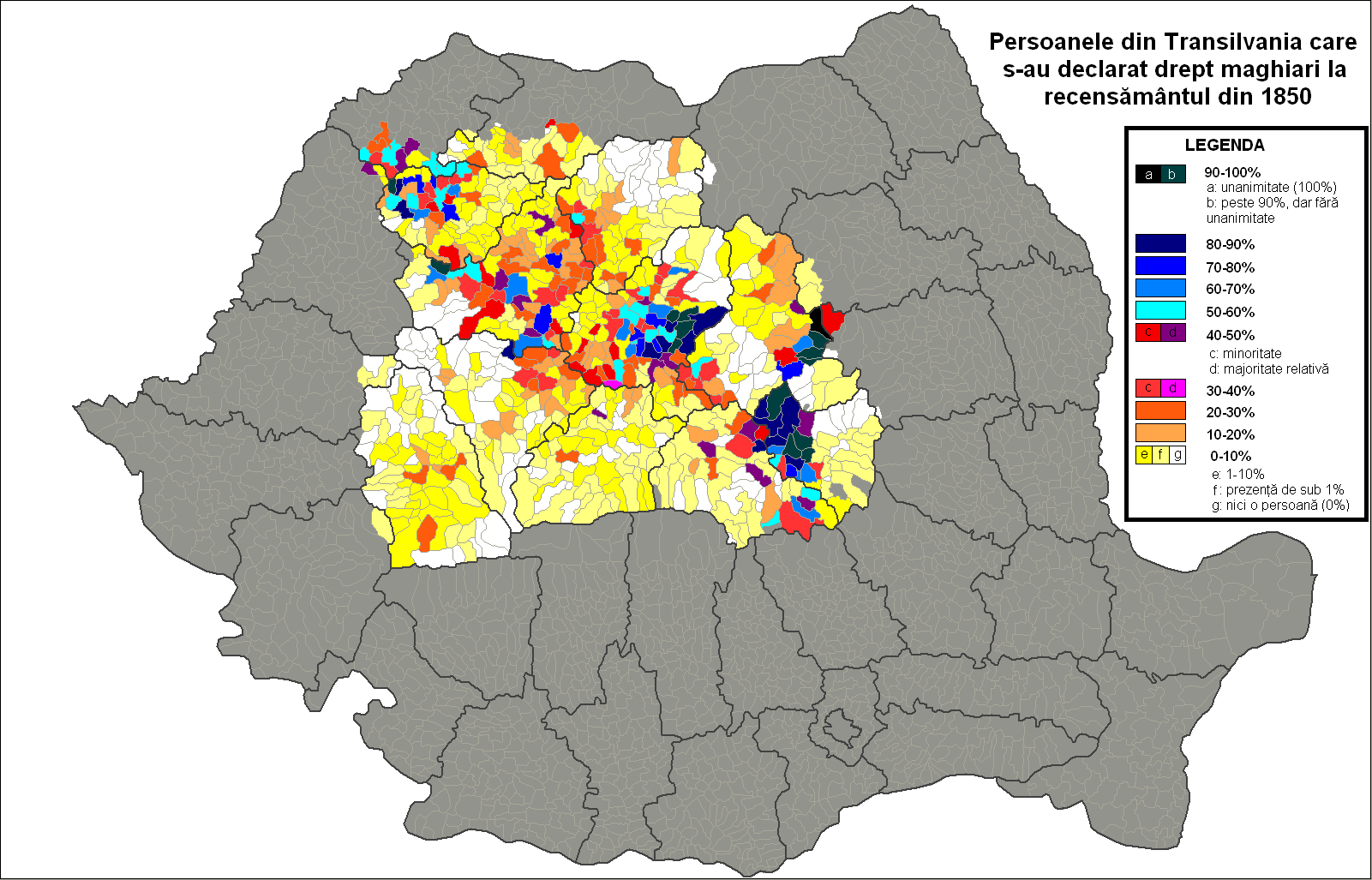 Persoanele declarate drept "maghiari" la recensământul organizat de autorităţile habsburgice în Transilvania în anul 1850. Se pot observa mare diferenţe regionale. Secuii din fostele scaune Arieș, Mureș şi Sf. Gheorghe s-au declarat de regulă "maghiari". Secuii din fostele scaune Ciuc, Chizd, Orbai şi Tileagd (Odorhei) s-au de regulă "secui". Harta reprezintă limitele administrative actuale: judeţe, comune, oraşe.